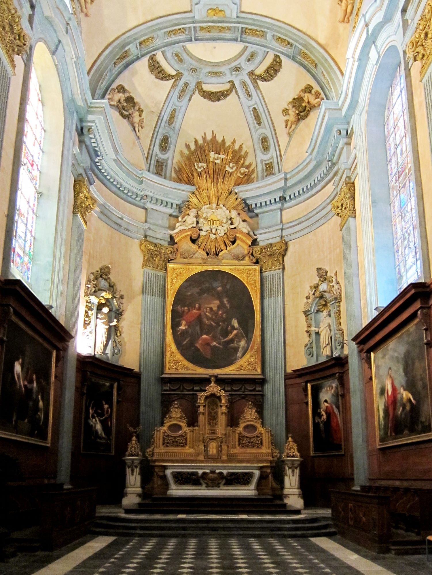 Le chœur de l'église sainte Marie-Madeleine de Lille (Nord).